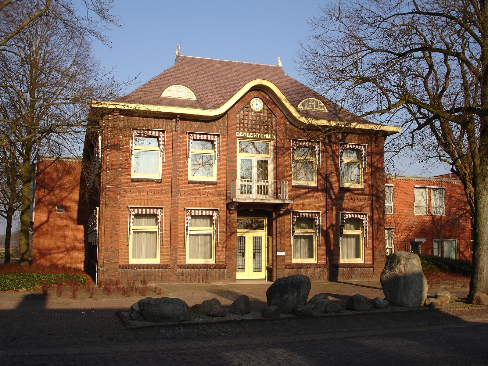 20060128 02 Sellingen